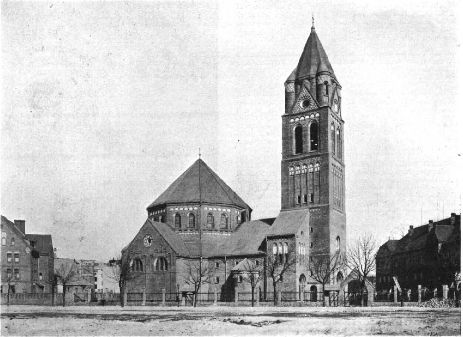 Maria, Hilfe der Christen in Berlin-Spandau Abbildung aus dem Zentralblatt der Bauverwaltung - Ansicht Askanierring